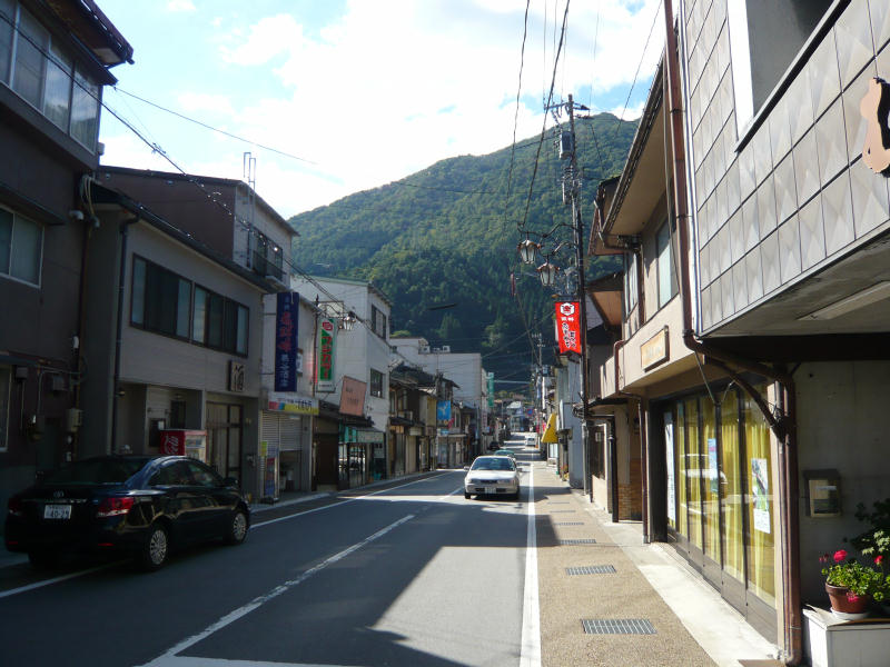 飛騨市船津の商店街